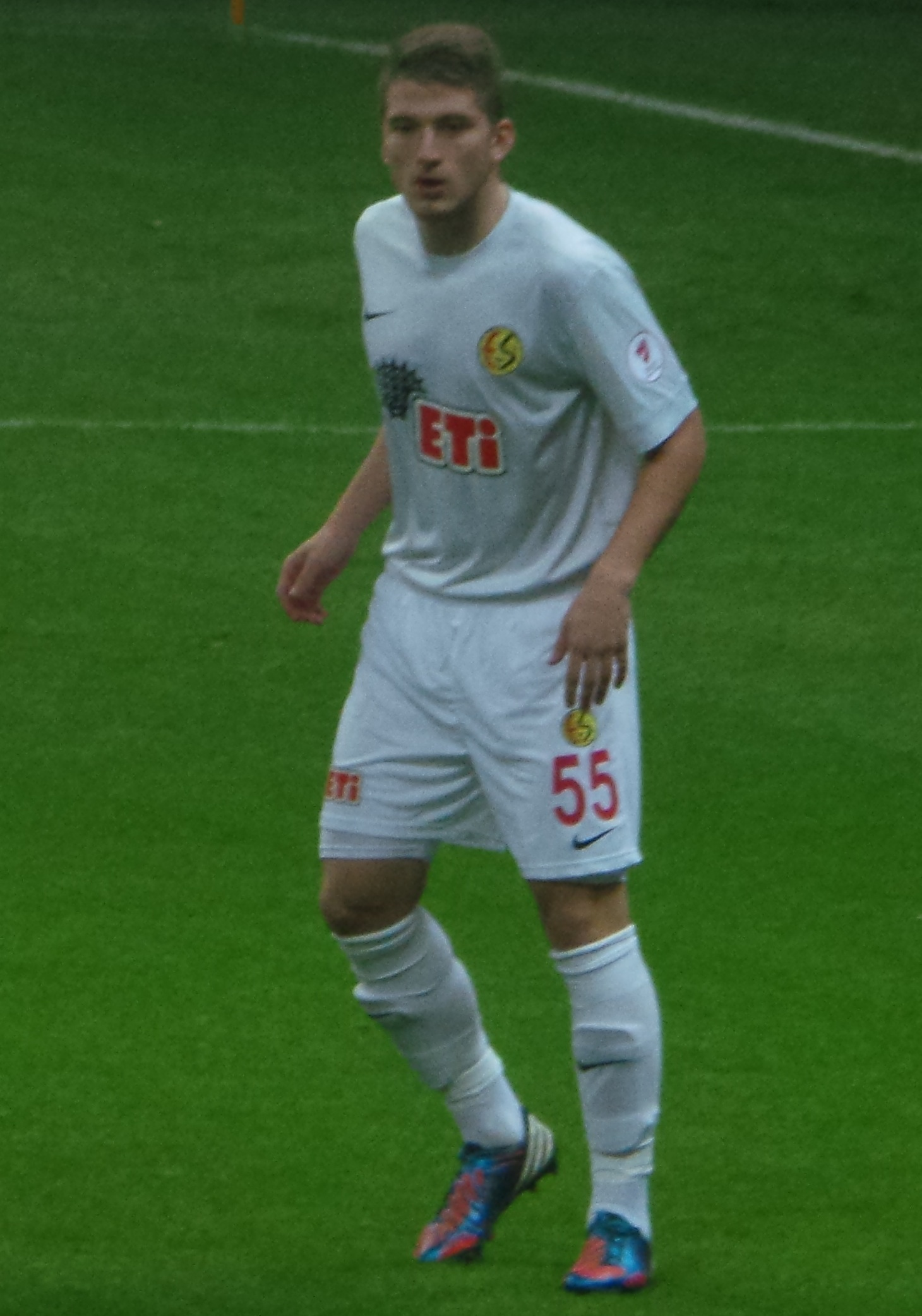 Semih Güler'